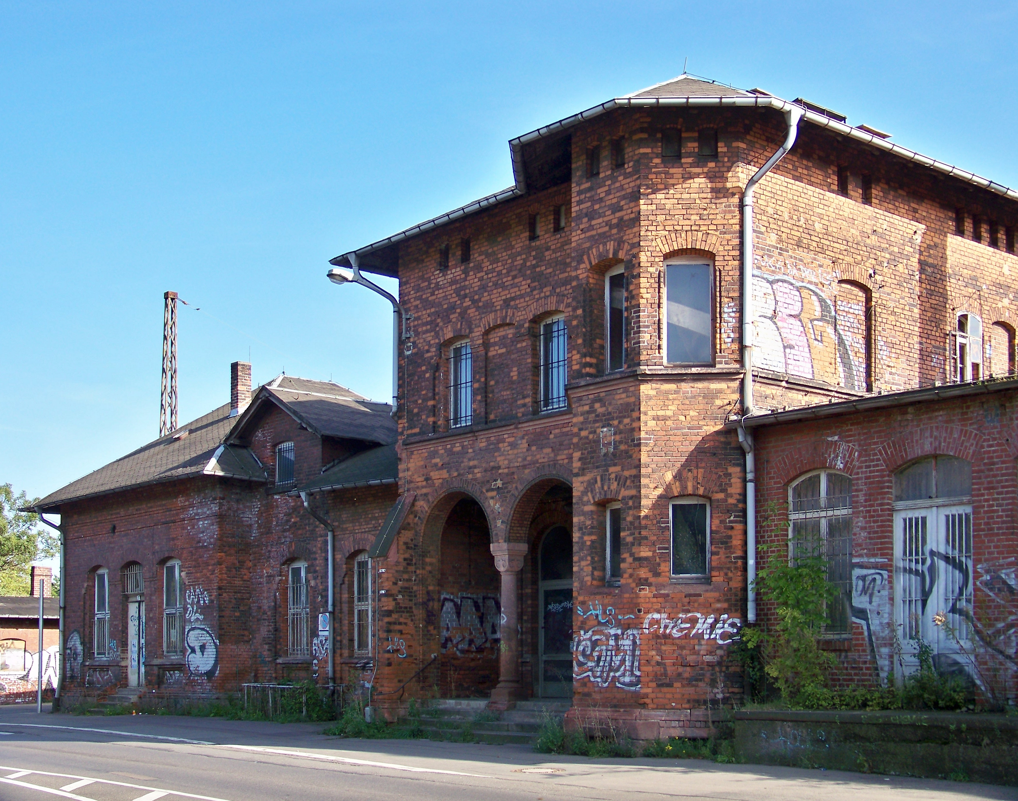 Empfangsgebäude des Bahnhofs Leipzig Leutzsch